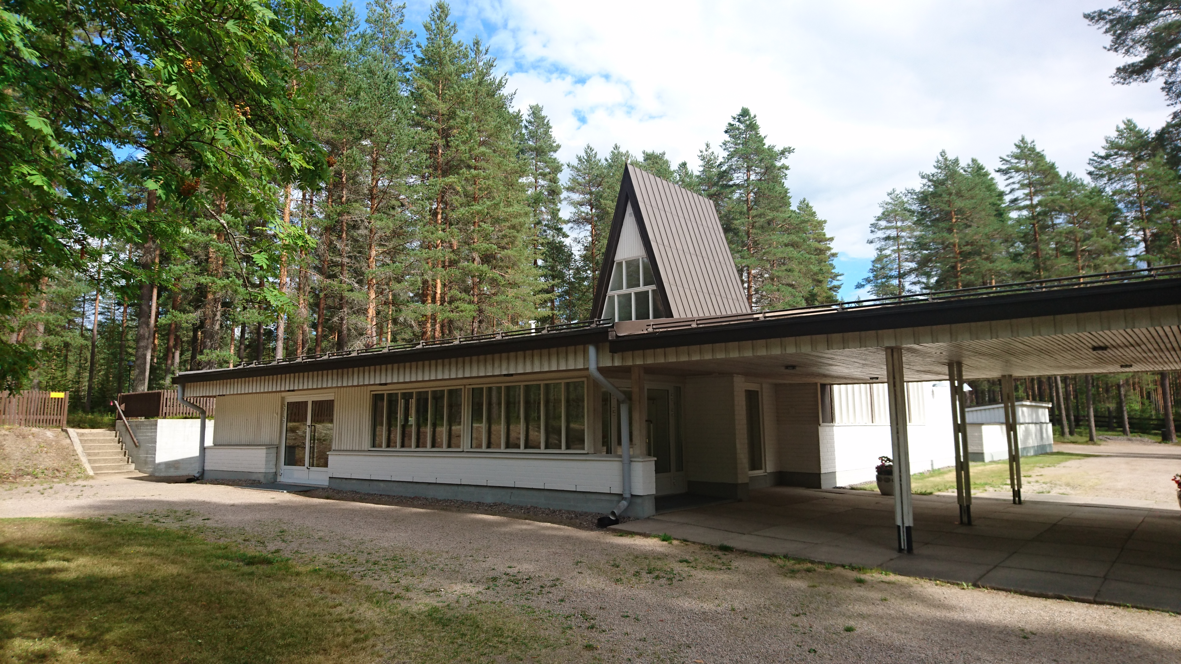 kappeli Saarijärvellä